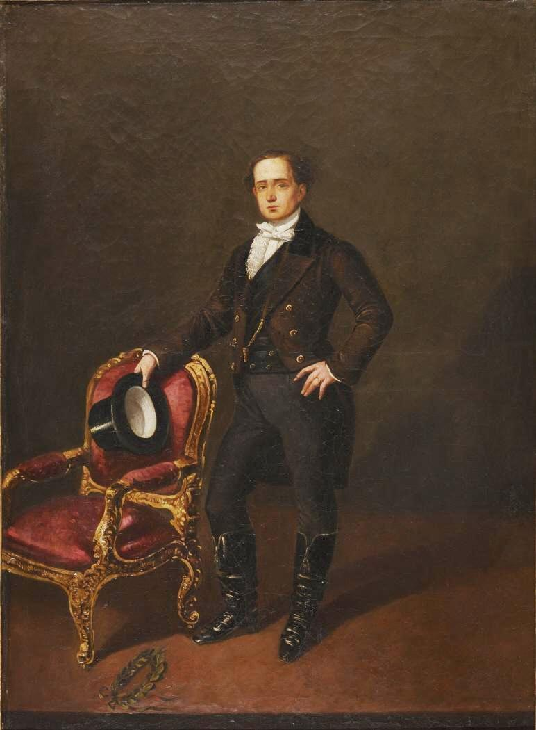 La obra representa al actor español Julián Romea (1813-1868), caracterizado para interpretar el papel de Sullivan.